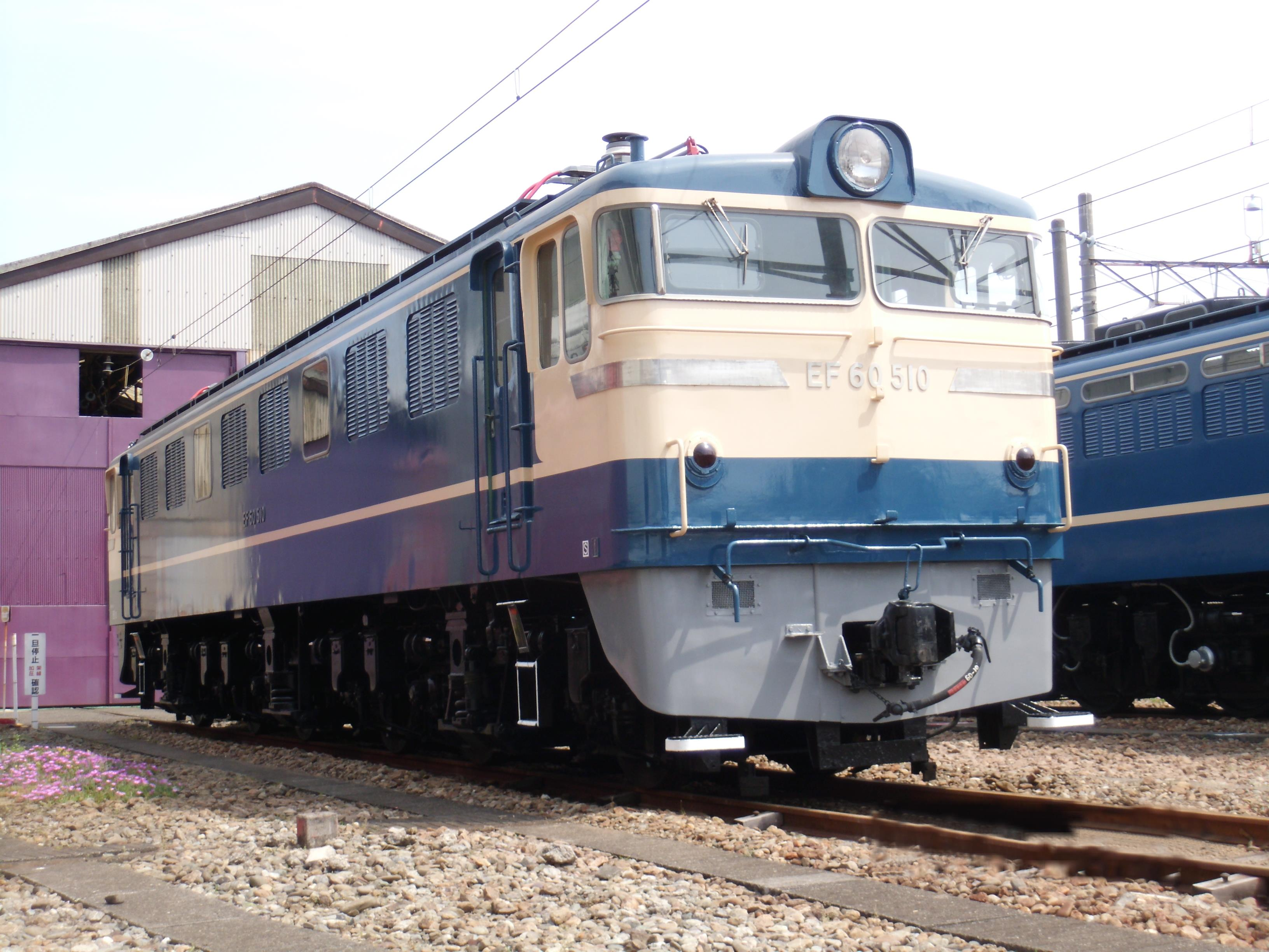 大宮総合車両センターで展示されたEF60 510－「JRおおみや 鉄道ふれあいフェア2012」にて